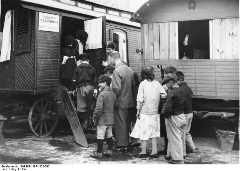 Berlin, Wagen der Stadtmission für Sinti und Roma Mit Berliner Zigeunermissionar im Zigeunerlager (Berlin Weißensee). Der Missionar und seine Gehilfin gehen mit ihren Schutzbefohlenen zur Missionsstunde, die in jeder Woche 2x stattfindet im Missionswagen der Stadtmission.